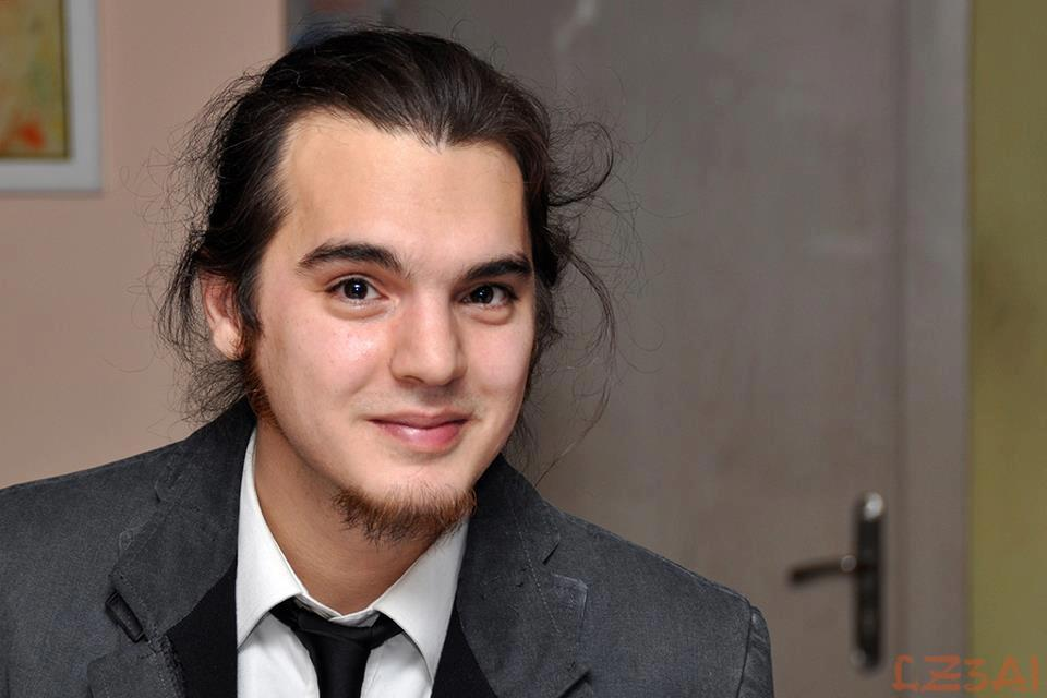 dr.sencer sari